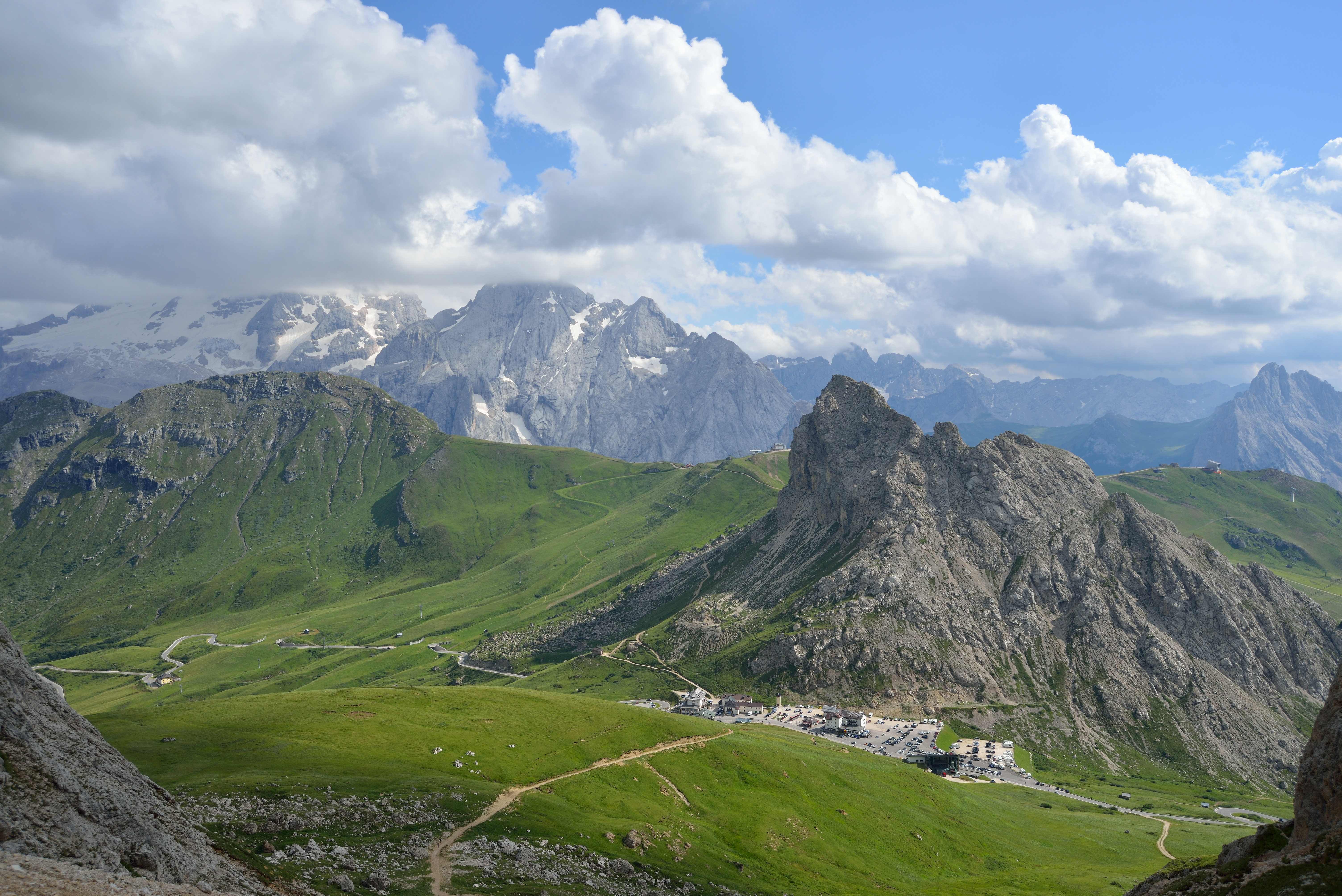 Il Passo Pordoi dal Sasso Pordoi - Canazei, Trento, Italia